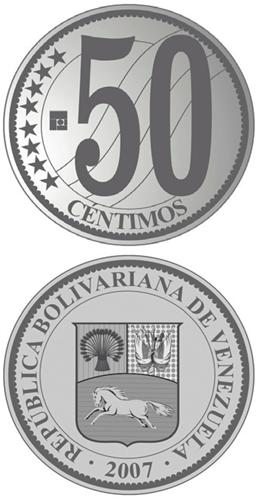 Bolivar Fuerte